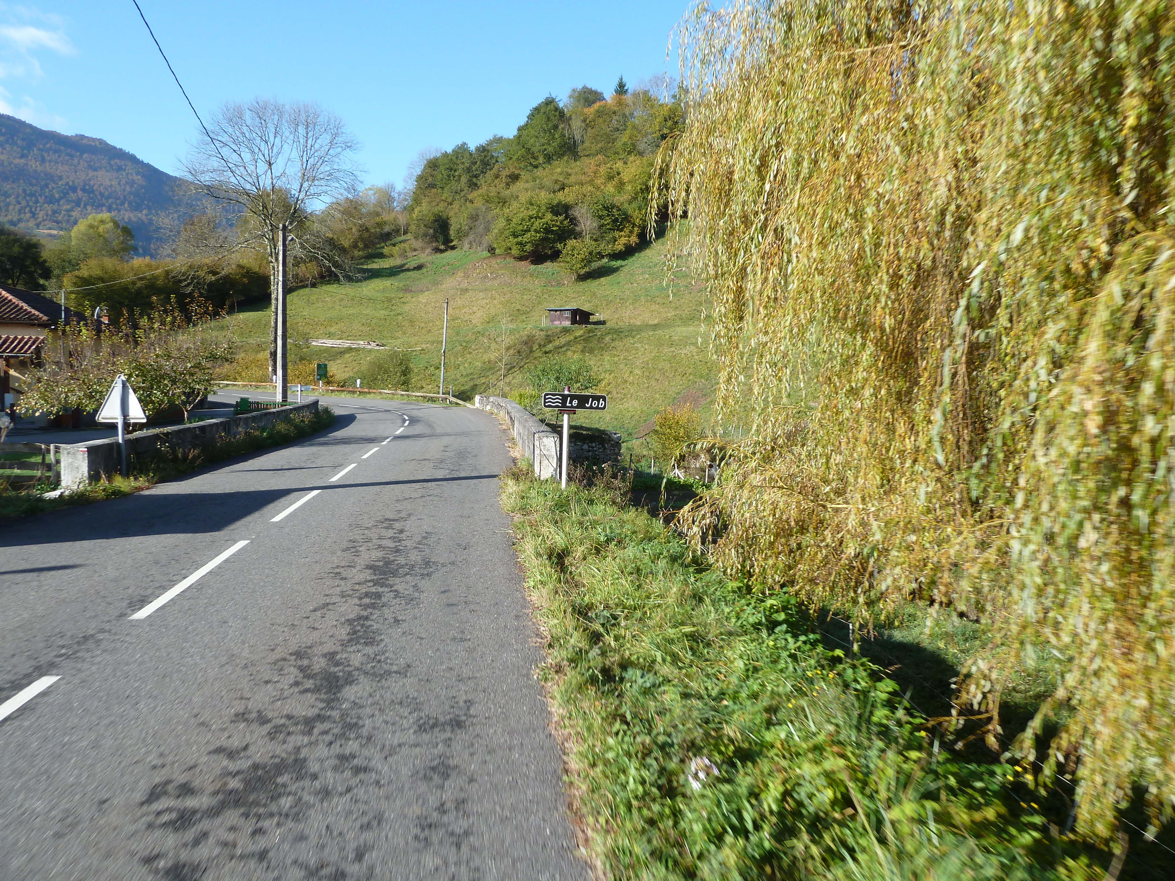 Le Job est une rivière qui coule dans le département de la Haute-Garonne (france). Prise de vue vers Cazaunous.